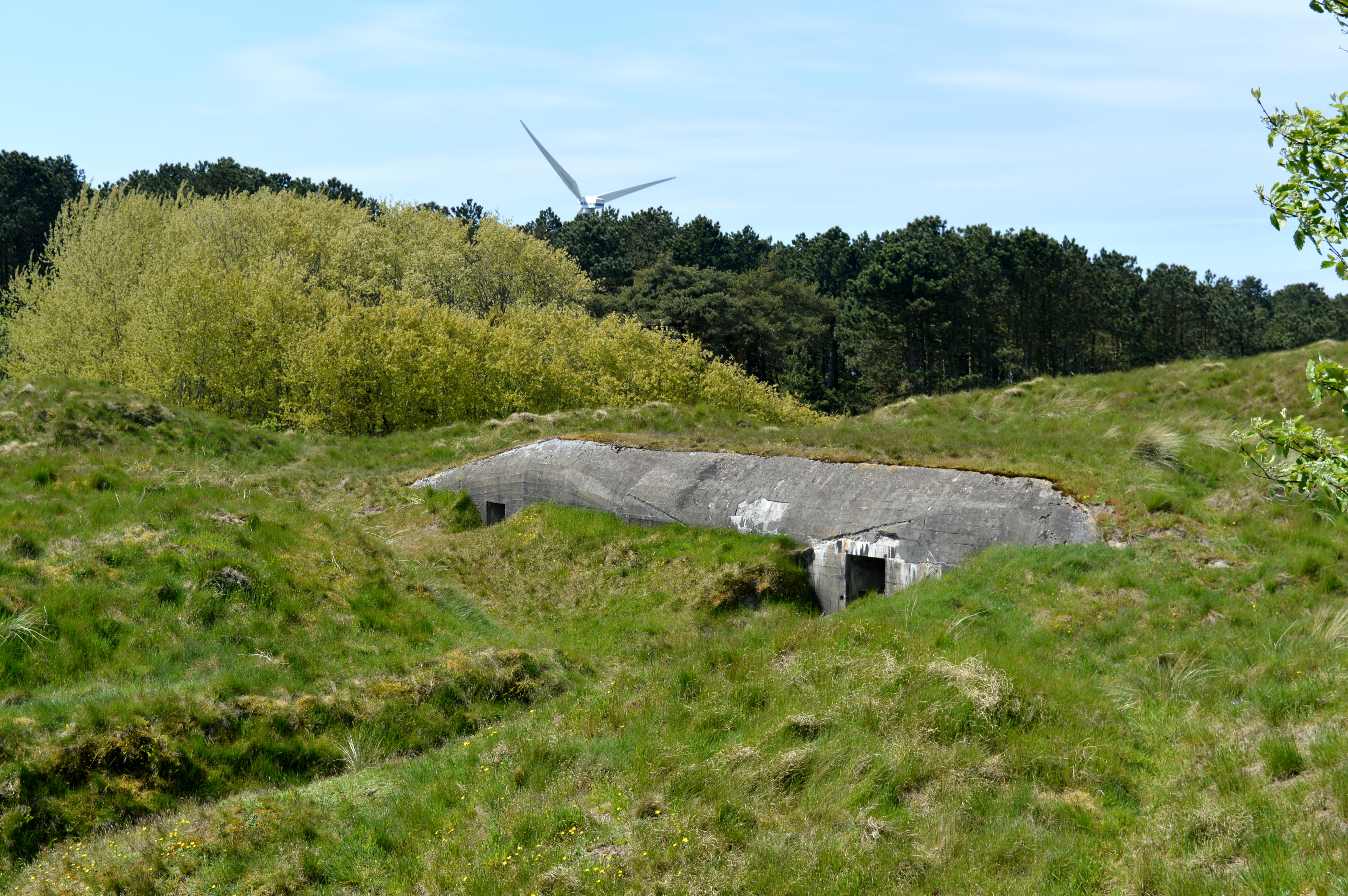 Fanø - Bunker